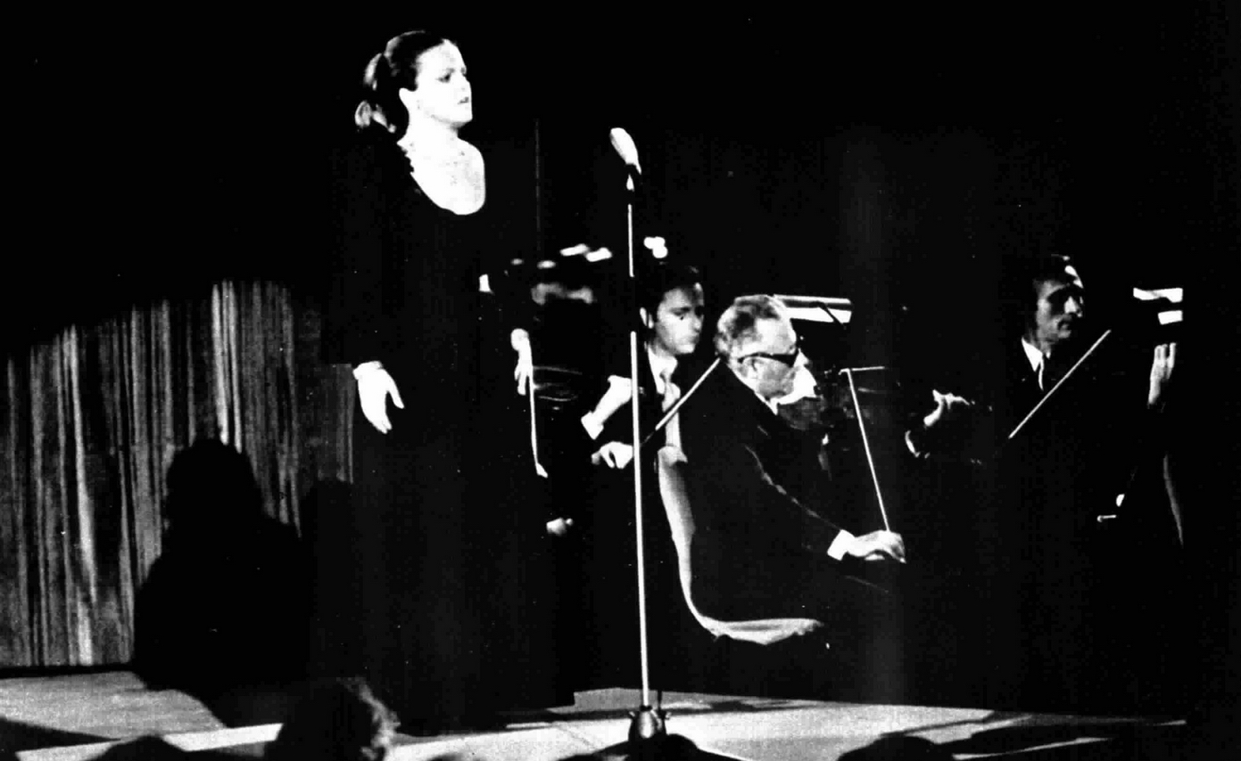 Italian singer Katia Ricciarelli at "Omaggio a Rossini"